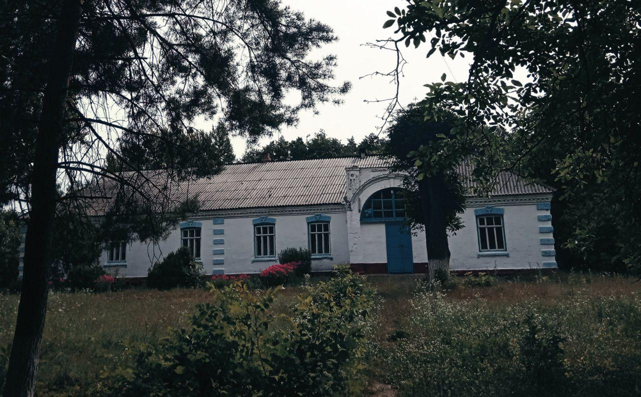 "Старша" школа - будівля, в якій навчались 5-9 класи